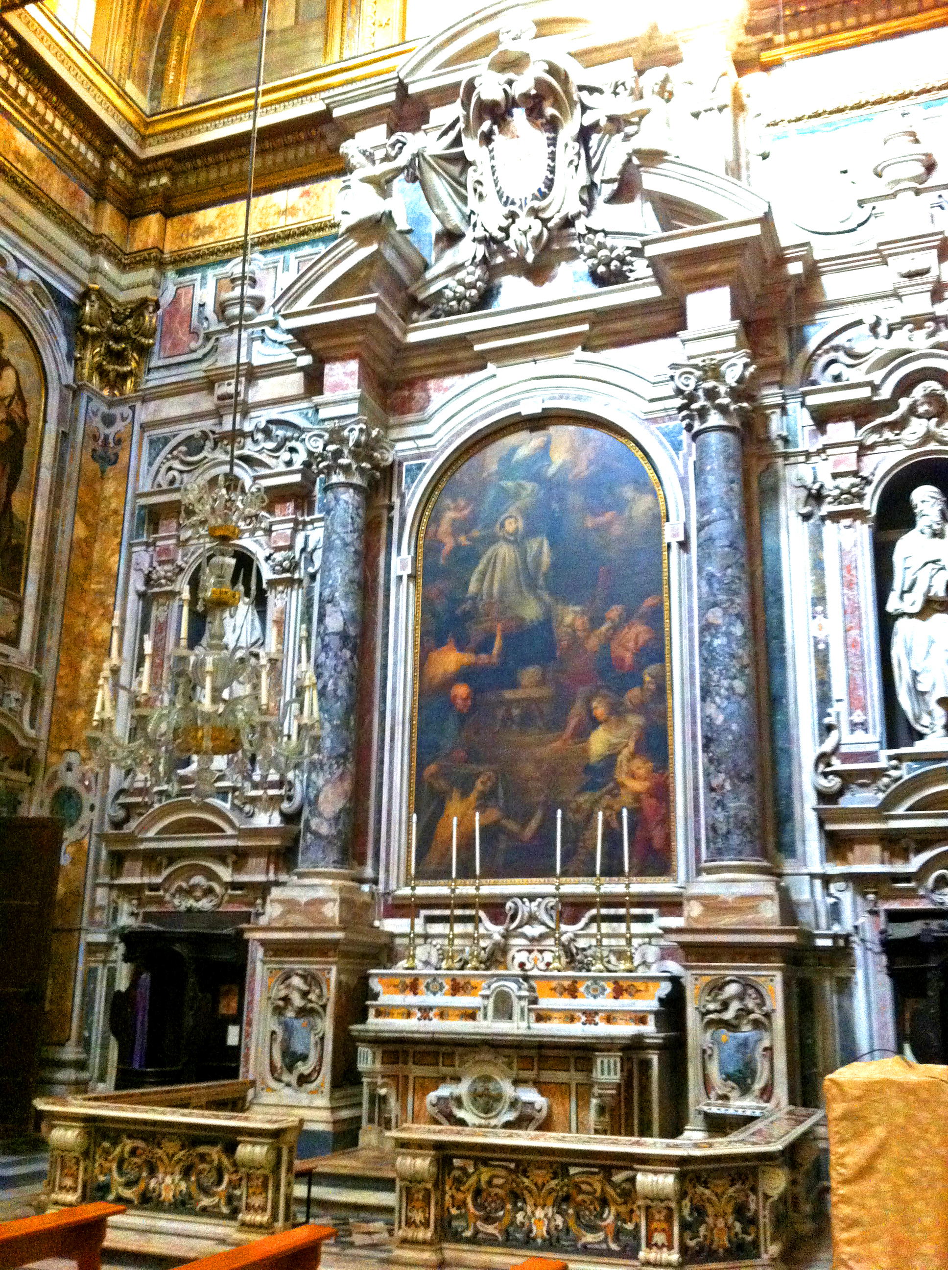 Cappellone di Sant'Ignazio nella Chiesa del Gesù Vecchio a Napoli, entrando in chiesa sulla destra dell'altare principale.